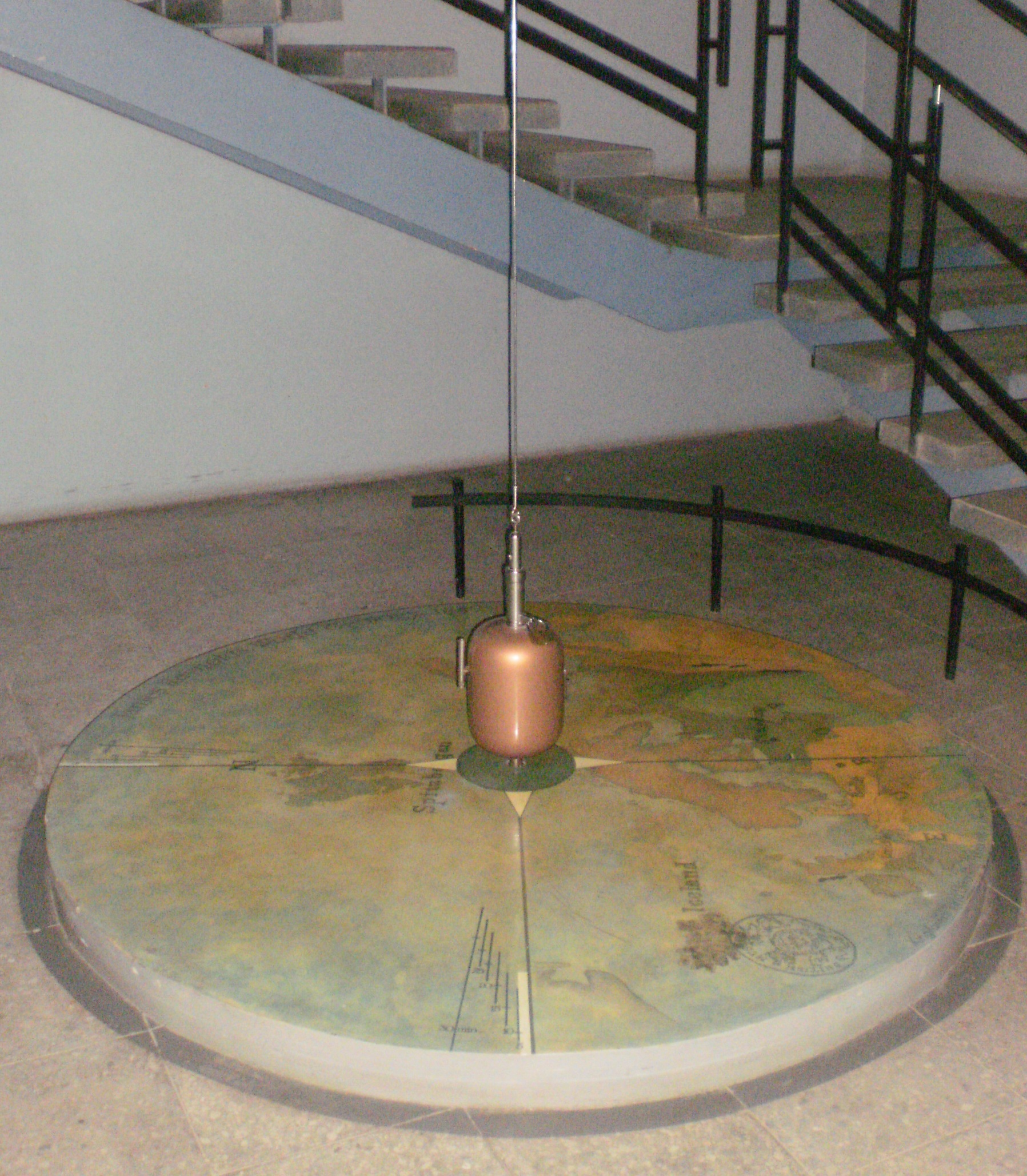 Foulcault' pendel Tartus Tähe tänaval endises füüsikahoones. Aastast 2014 asub pendel Tartu Ülikooli muuseumis.